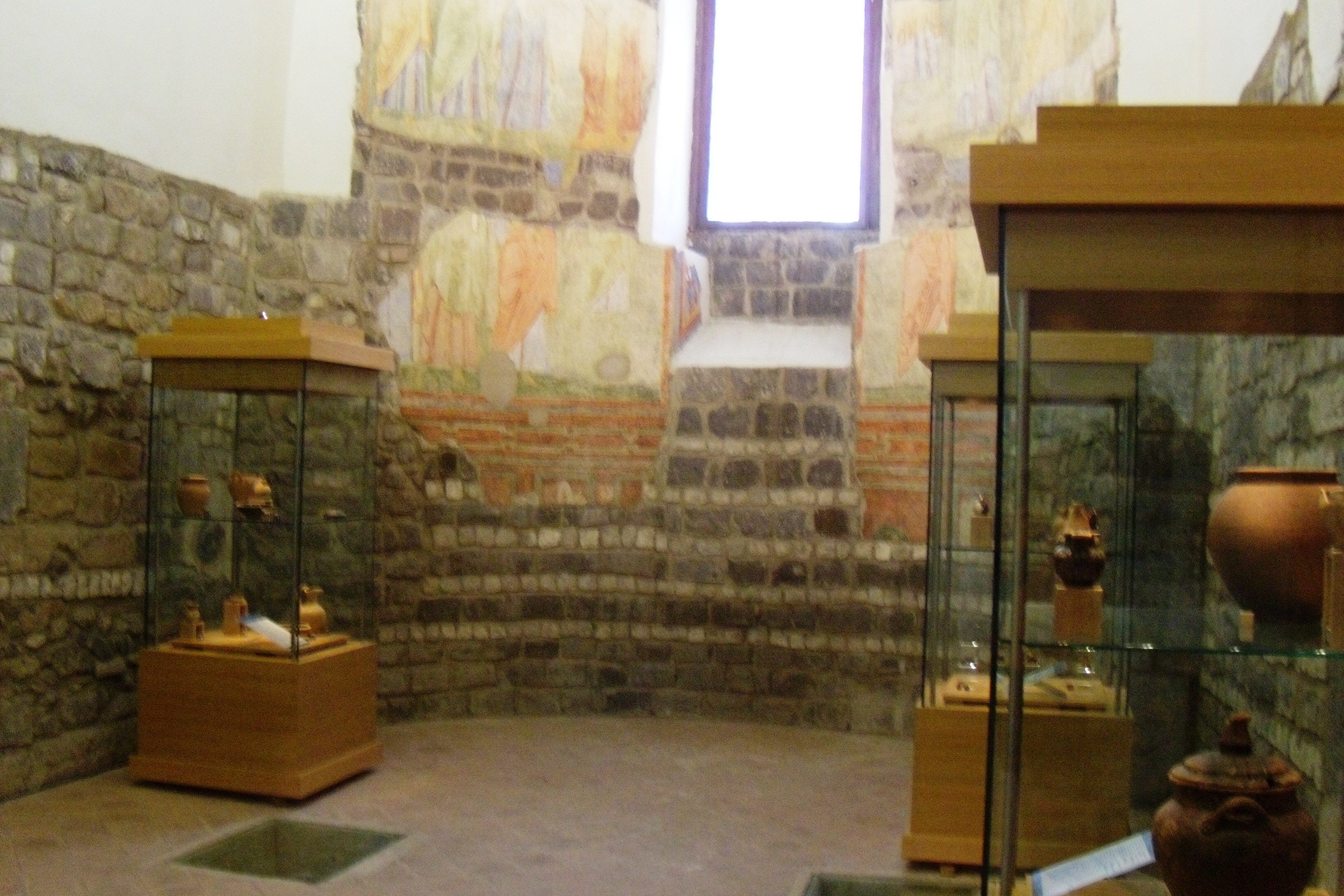 La sala dei reperti provenienti dalle necropoli sannite di Telesia. Antiquarium di Telesia presso l'Abbazia benedettina del Santissimo Salvatore in San Salvatore Telesino, provincia di Benevento.